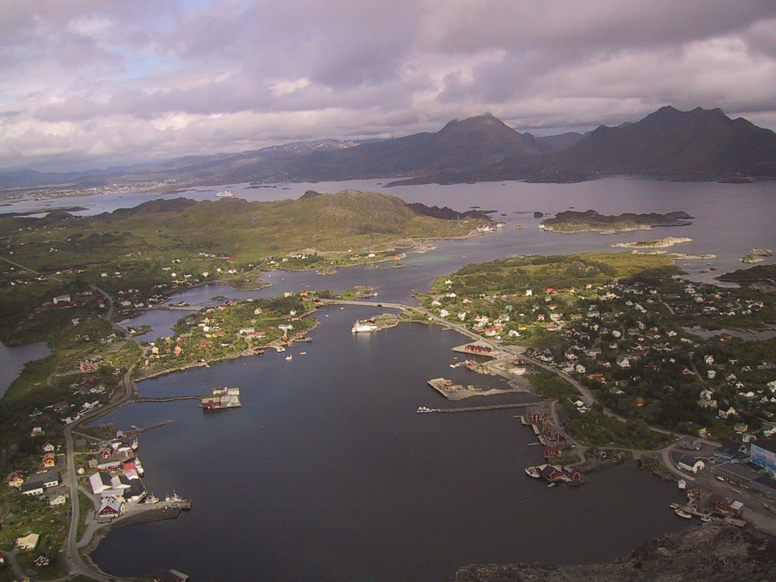 Ballstad sett fra fjell